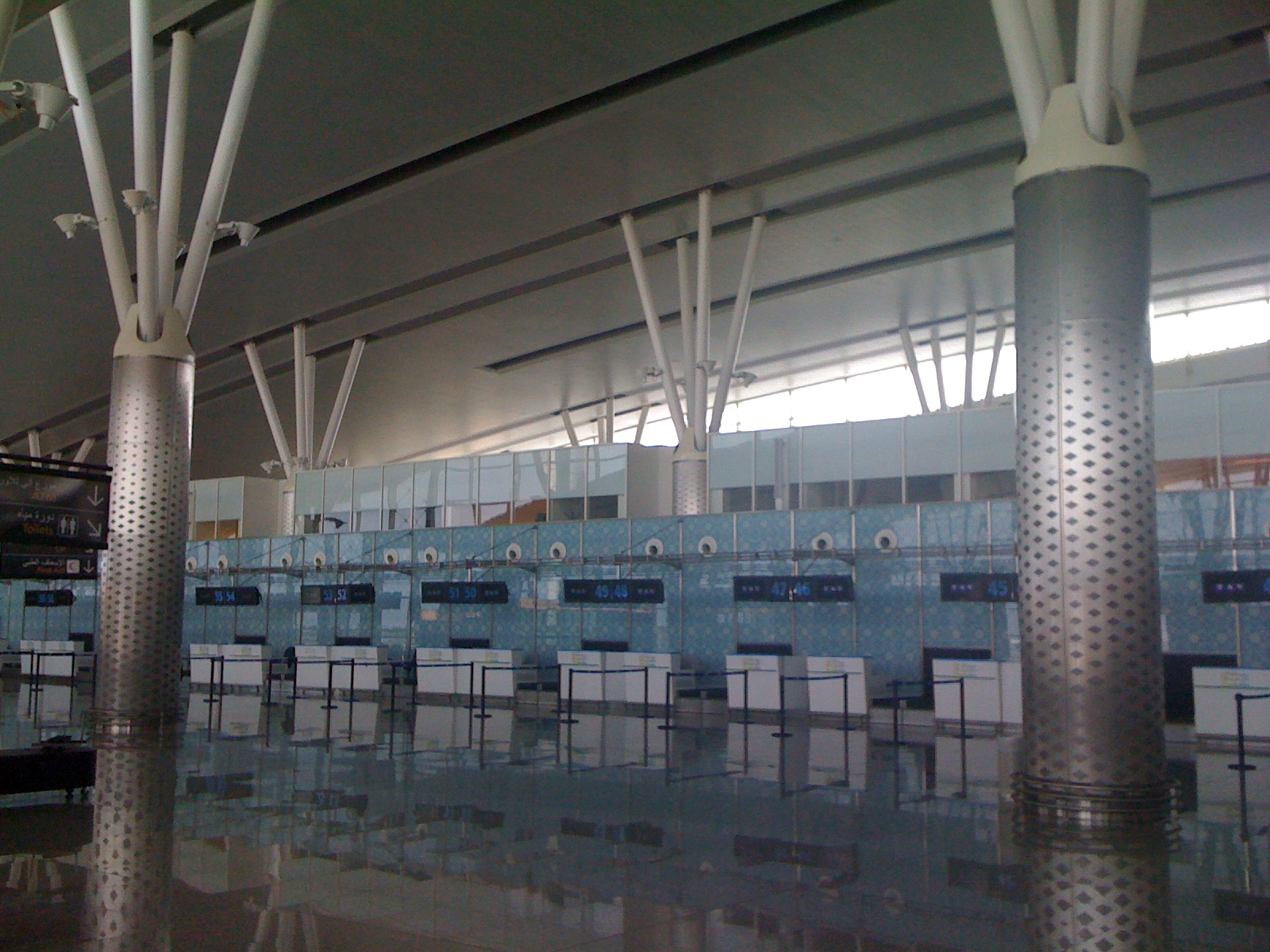 Guichets au niveau départ de l'aéroport international d'Enfidha